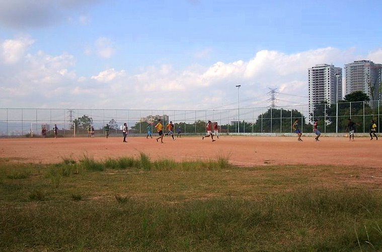 Uma partida de futebol, no Parque Raposo Tavares, distrito homônimo da cidade de São Paulo, Brasil.